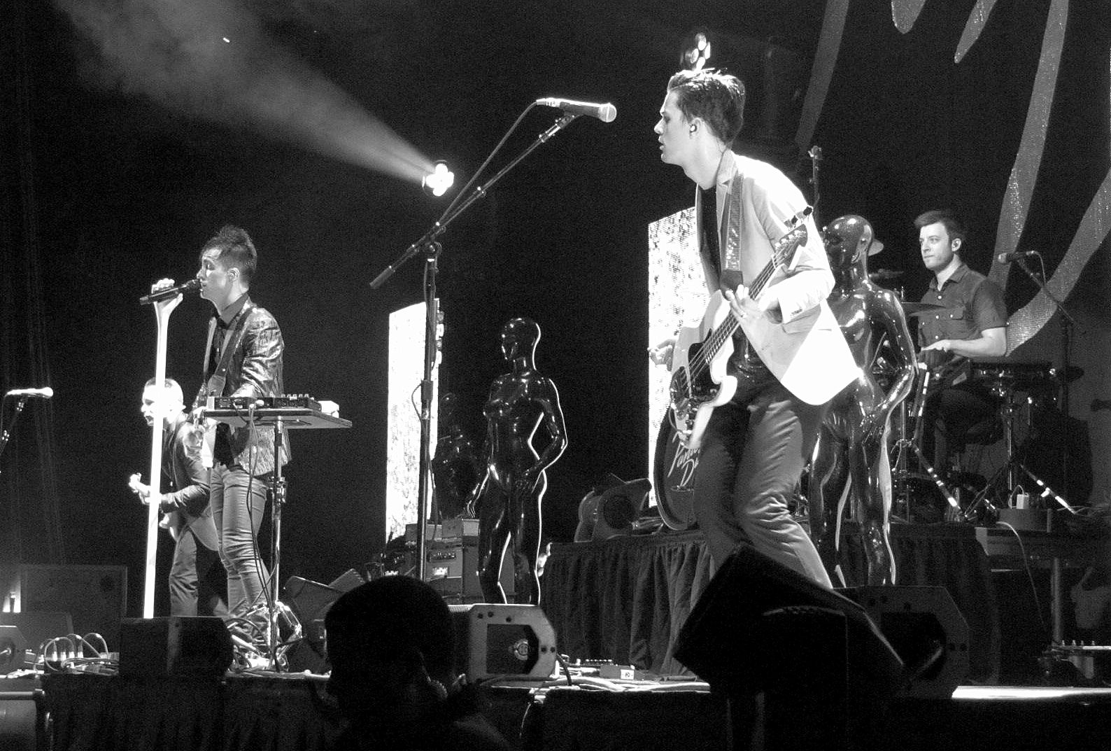 Panic! at the Disco en vivo en Barclays Center, Brooklyn, el 7 de septiembre de 2013.